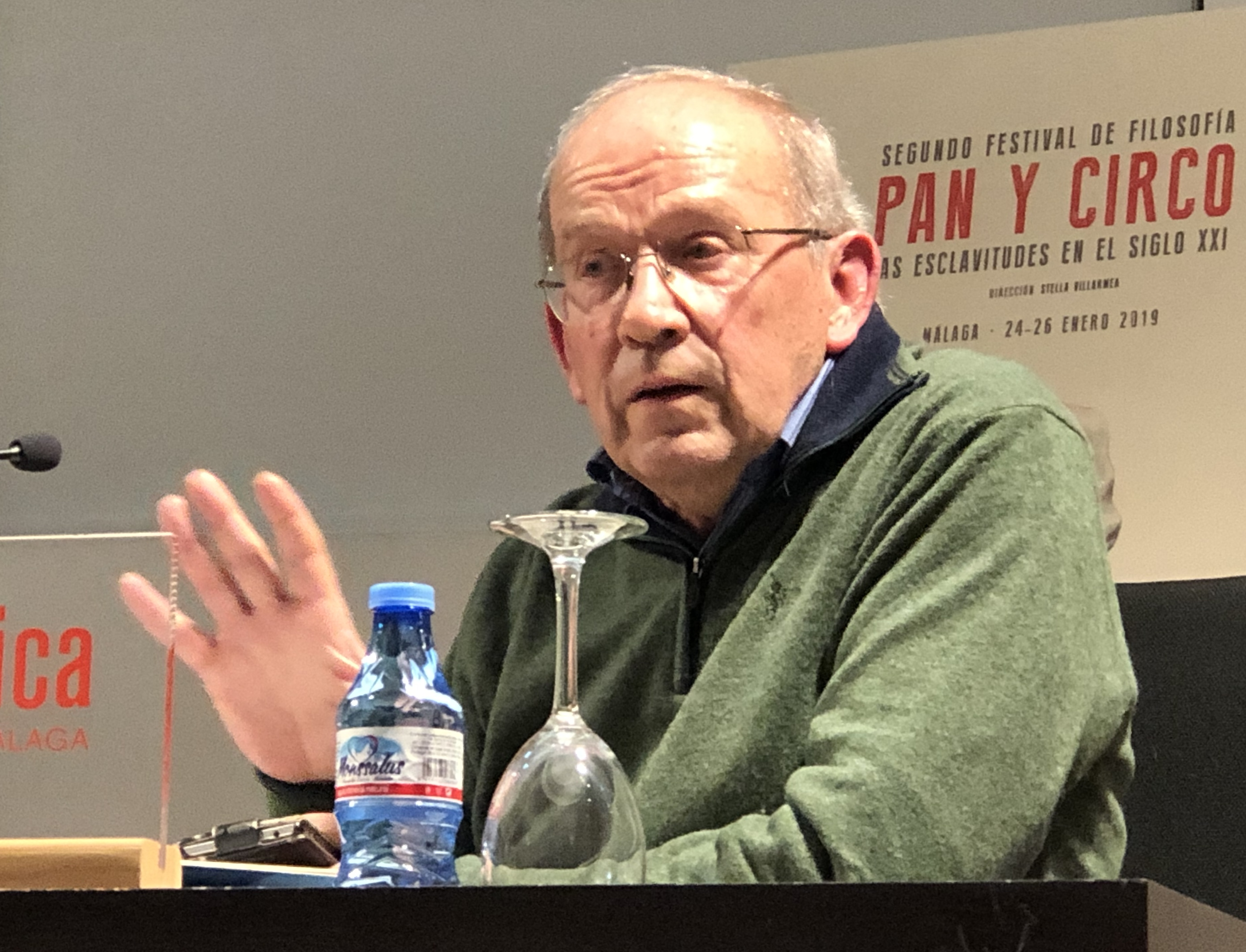 II festival de filosofía de Málaga